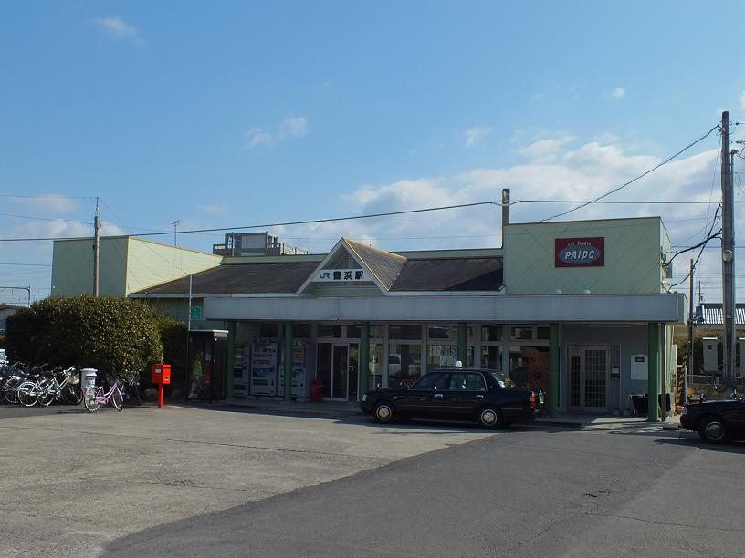 JR四国予讃線豊浜駅の駅舎